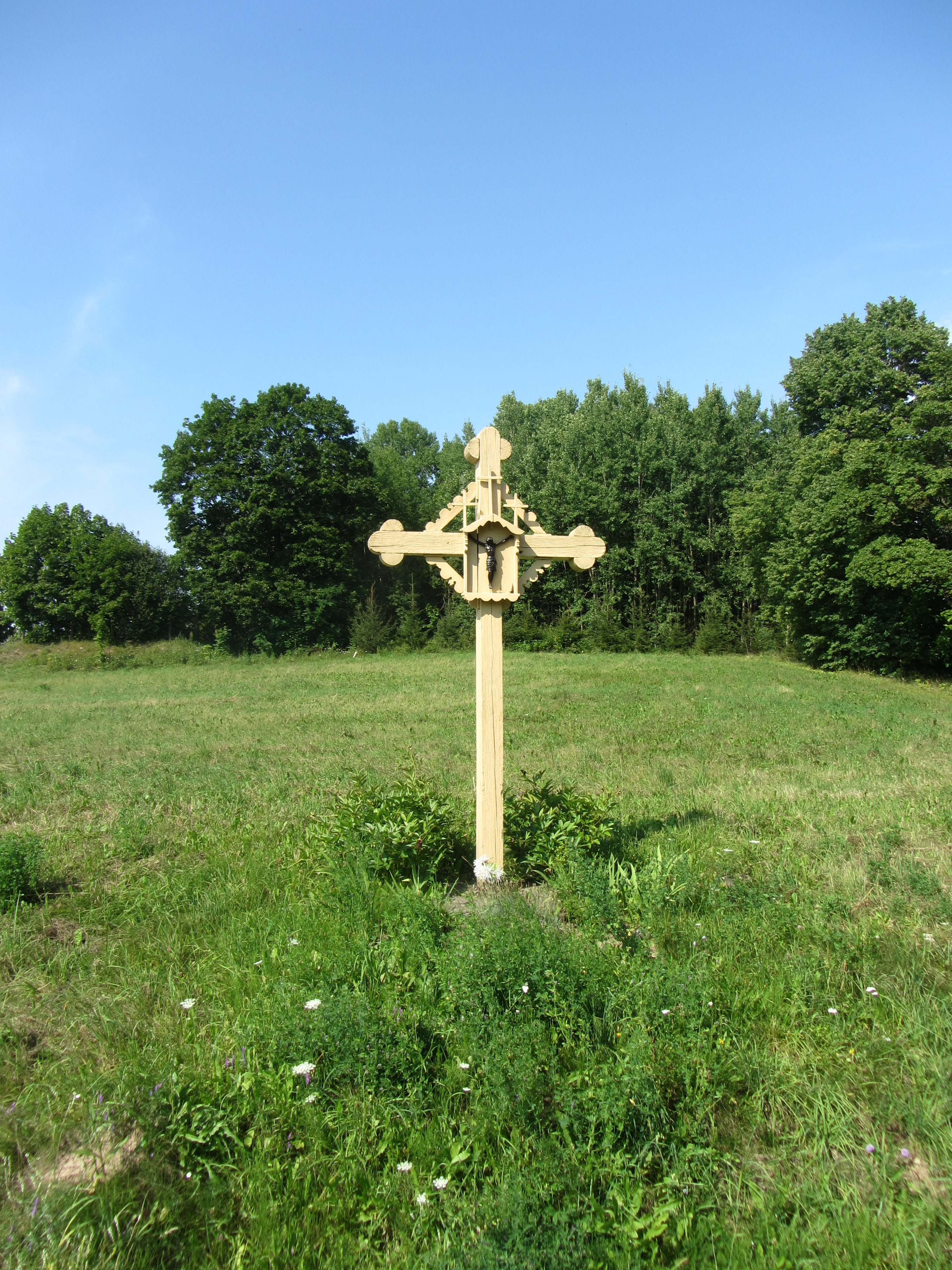 Baršėnai 42253, Lithuania